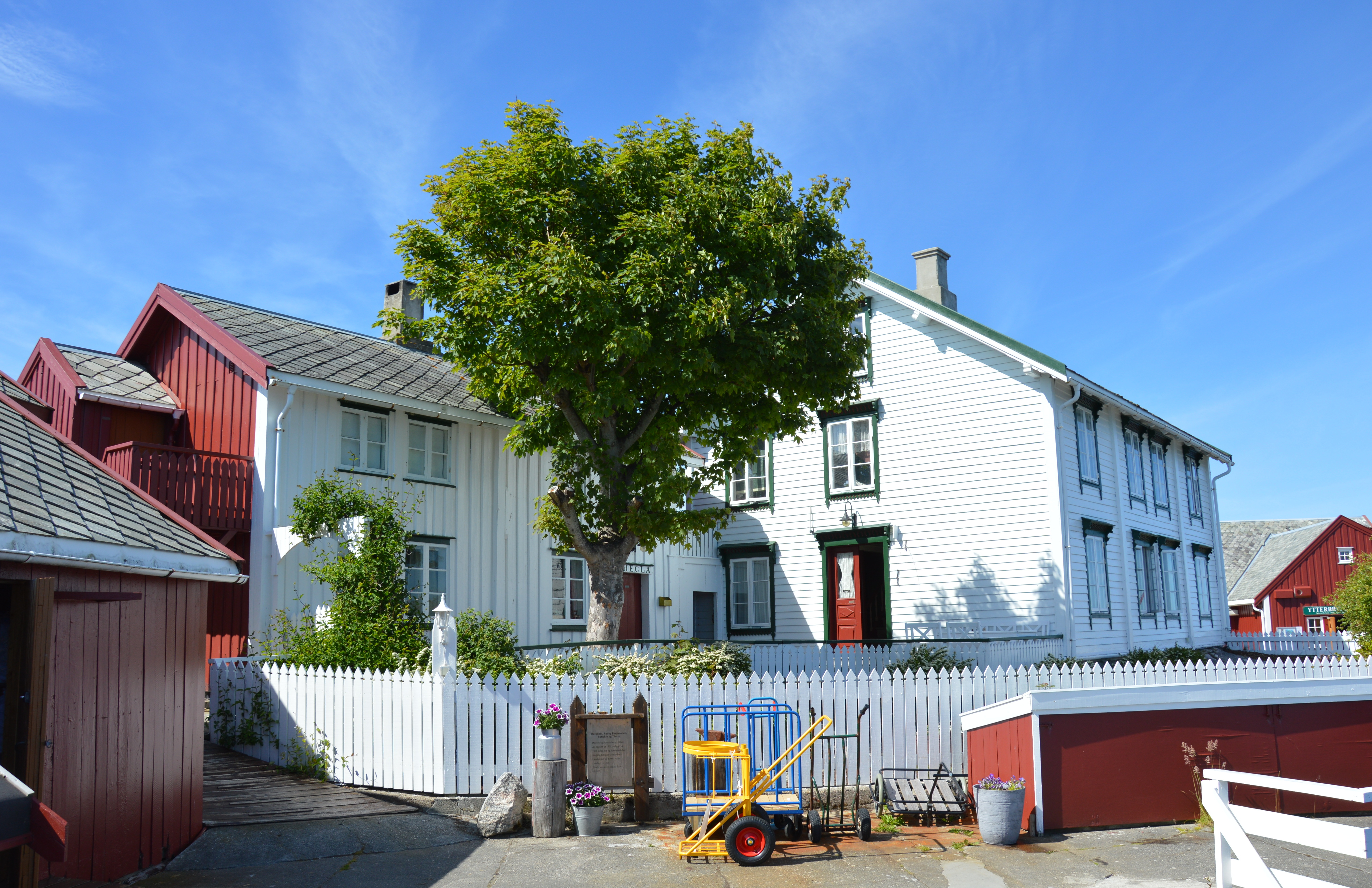 Håholmen